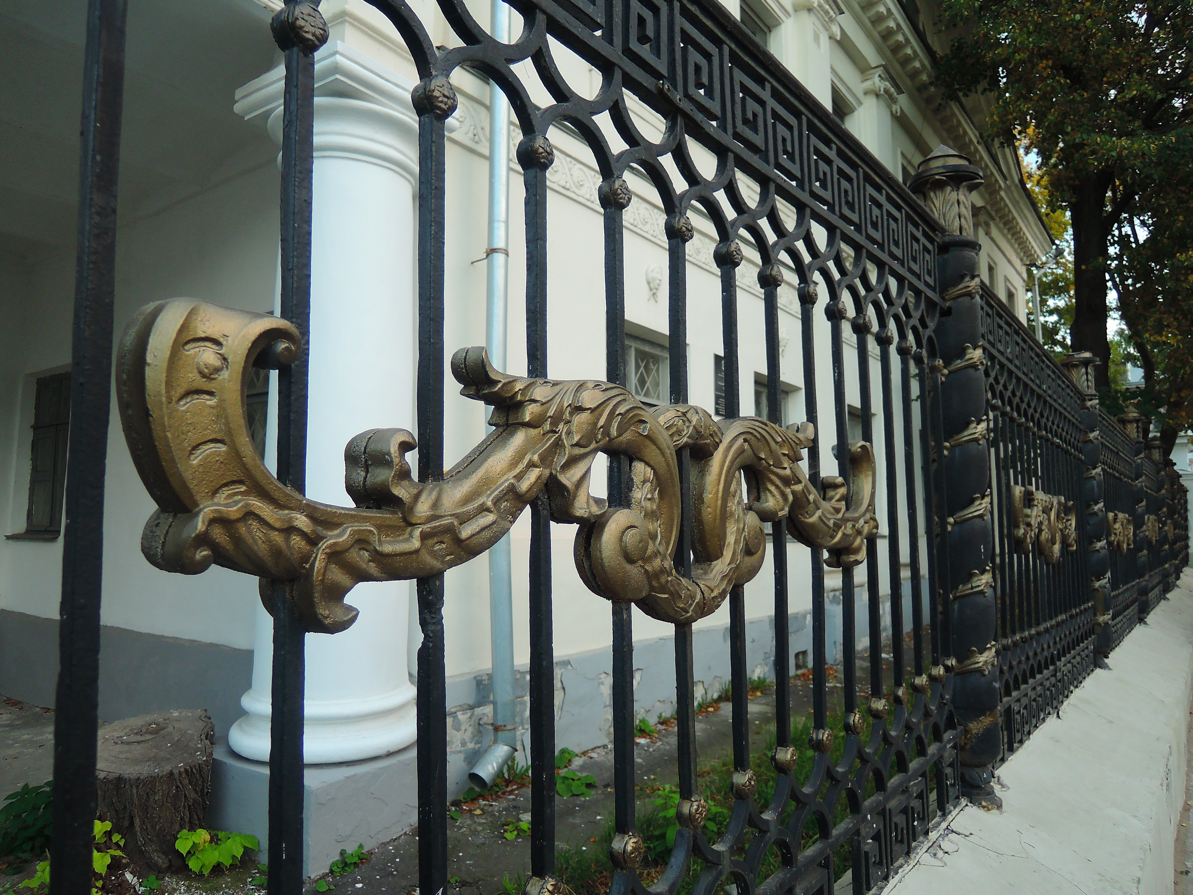 Ограда: улица Ильинская, 56, Нижний Новгород, Нижегородская область